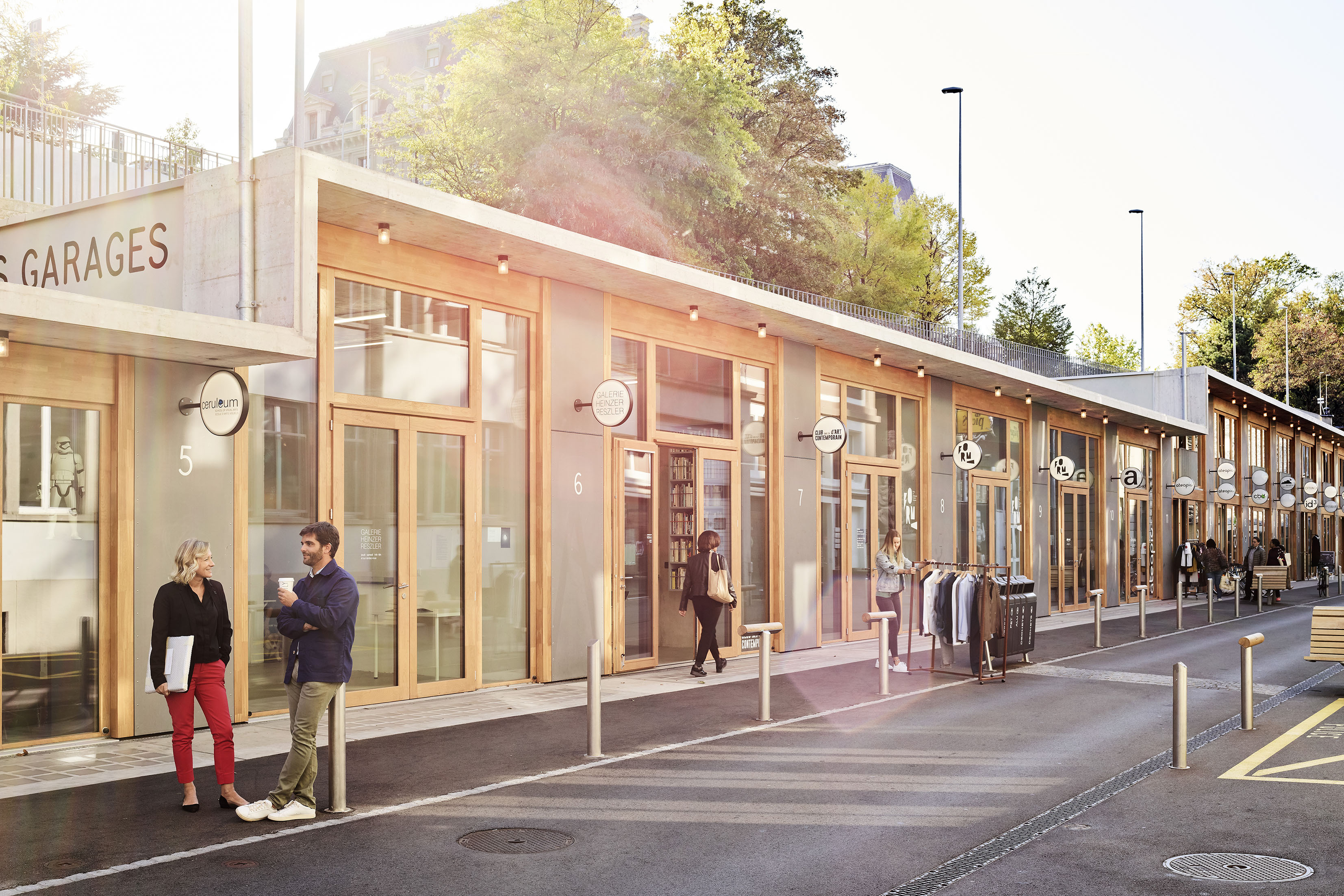 Les Garages en 2018